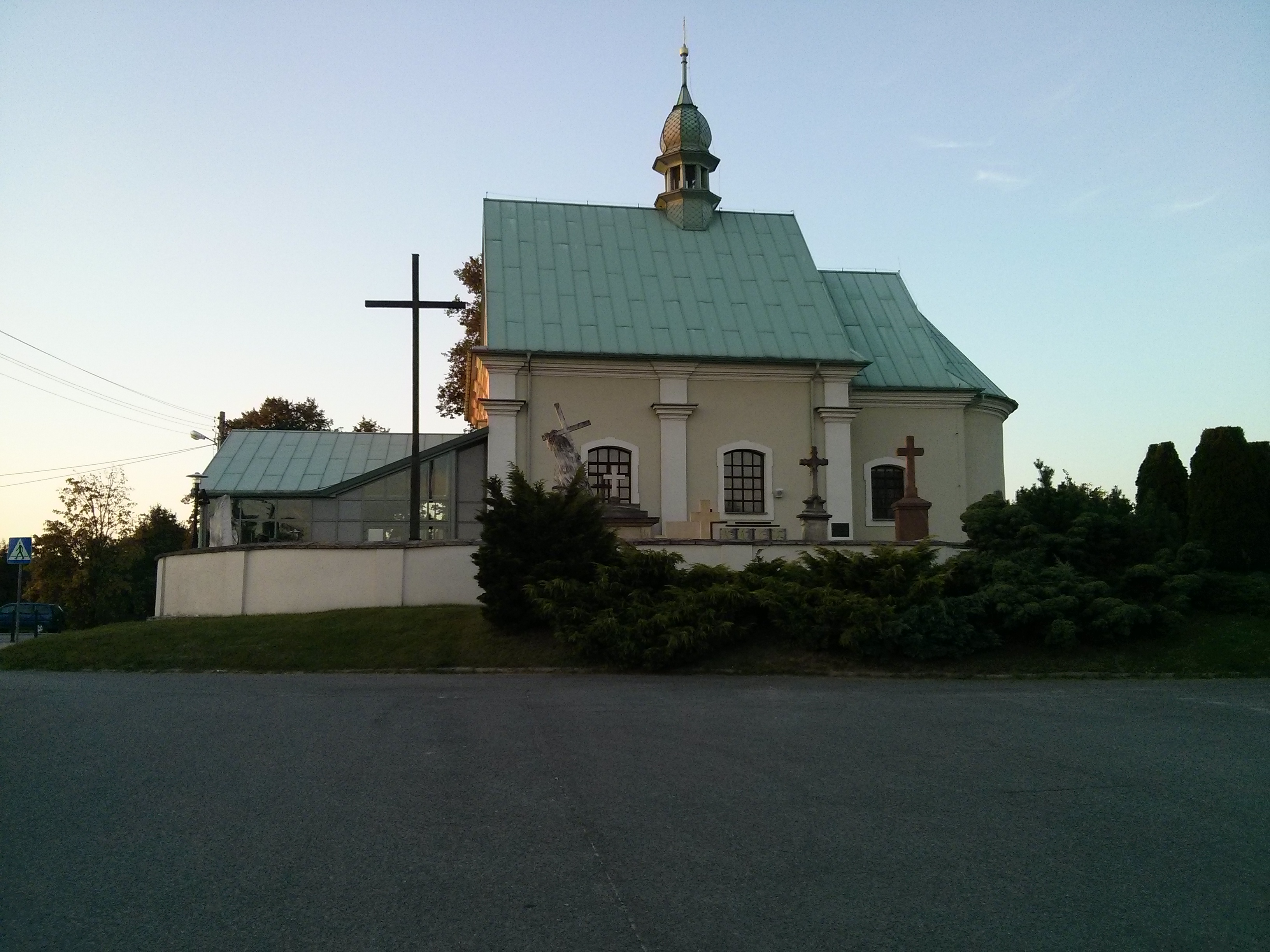 Końskie, kościół cmentarny pw. św. Jana Chrzciciela, obecnie par. pw. św. Anny, 1770, 1913 r., widok od strony parkingu